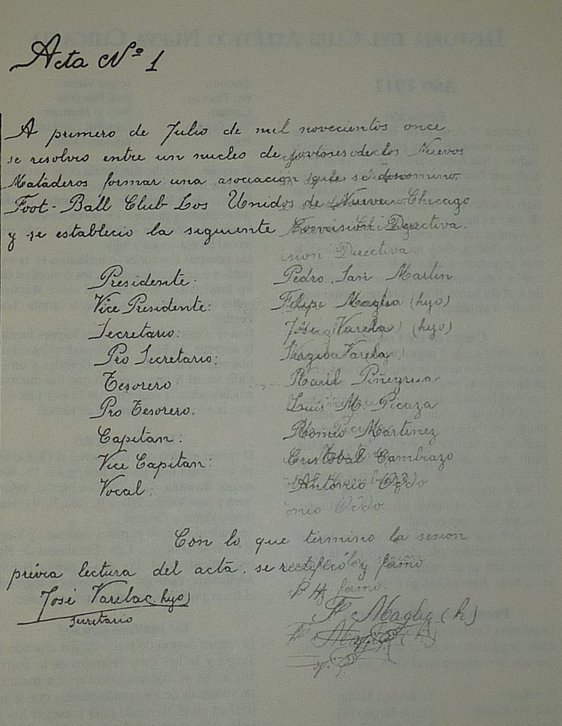 "A primero de Julio de mil novecientos once se resolvió entre un nucleo de jugadores de los Nuevos Mataderos formar una asociacion que se denomino Foot Ball Club Los Unidos de Nueva Chicago".